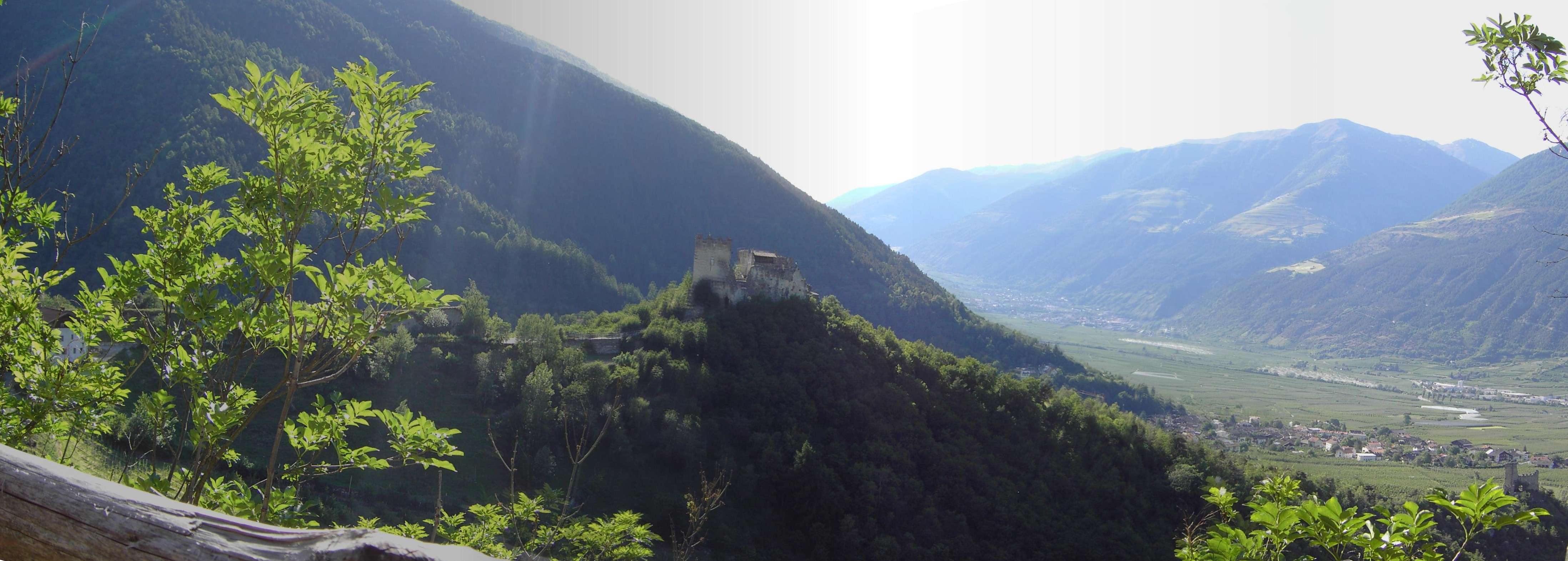 Burgruinen Ober- und Untermontani im Vinschgau (Südtirol)